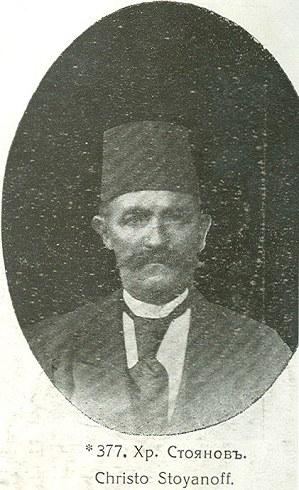 Hristo Stoyanov from Vladimirovo